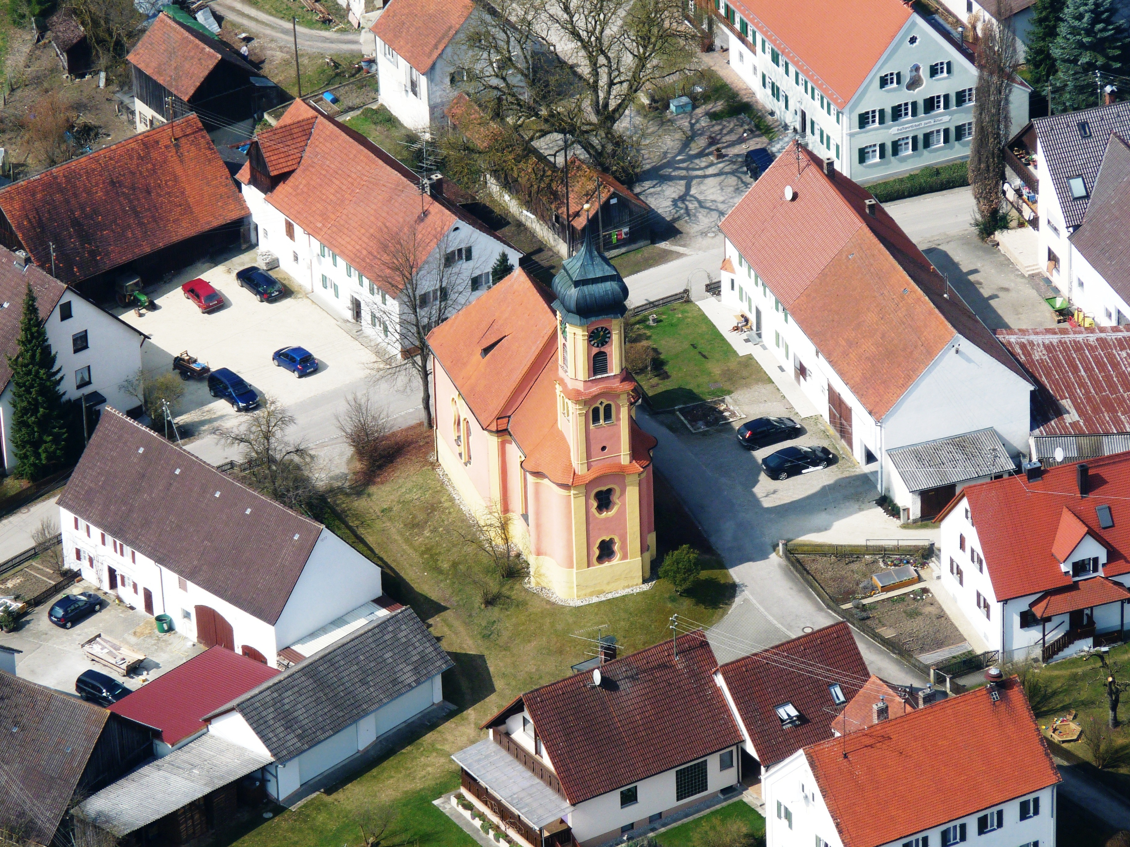 Kirche Wollishausen0904_299